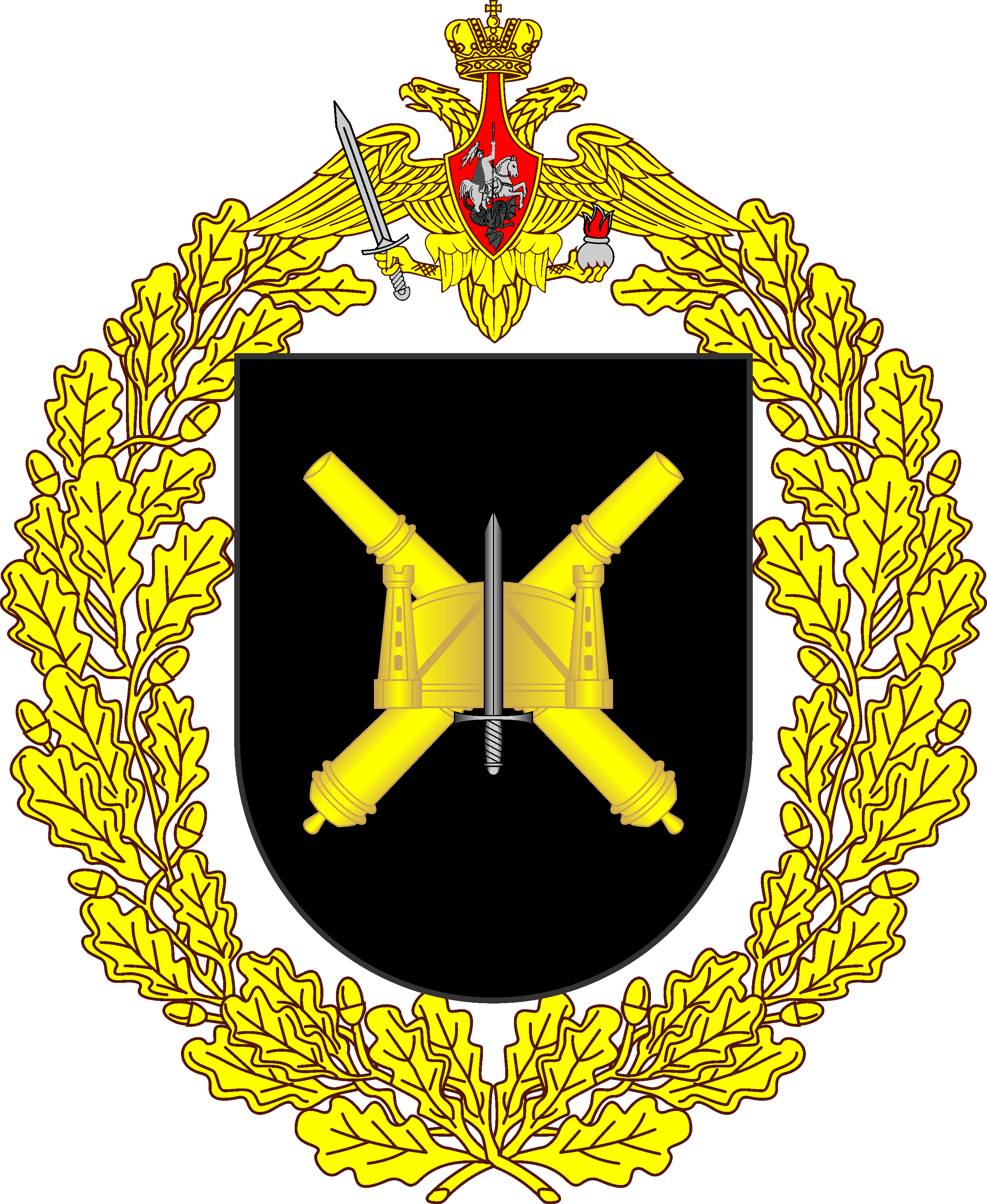 Эмблема 291 артиллерийской бригады